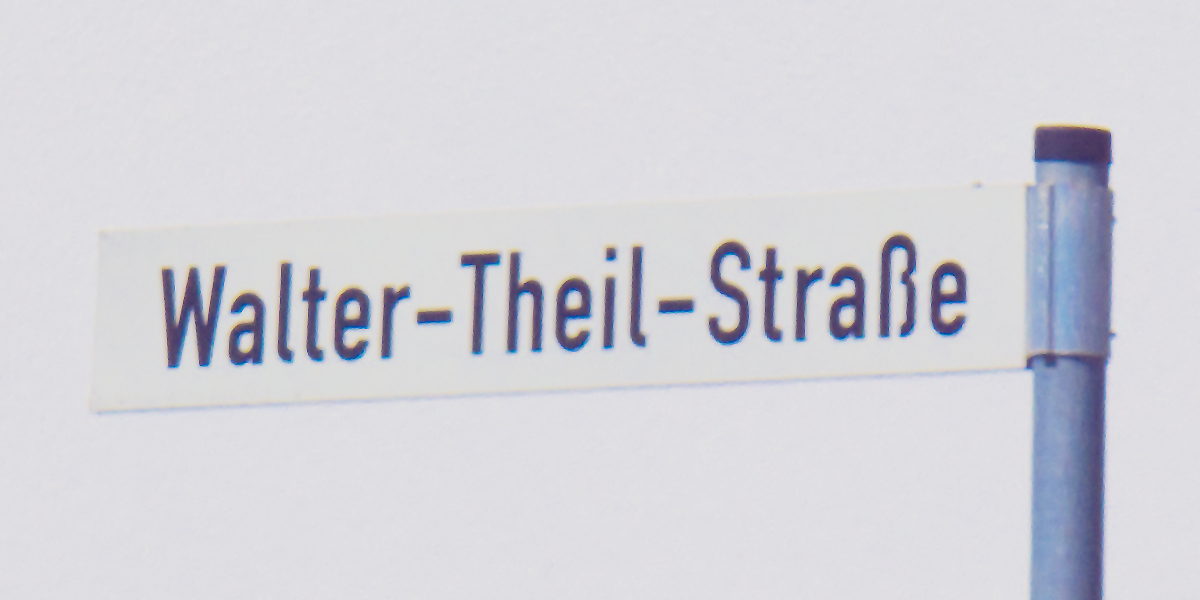 Nach dem früherem Bürgermeister und Ehrenbürger von Barsinghausen wurde eine Straße in einem Neubaugebiet benannt.